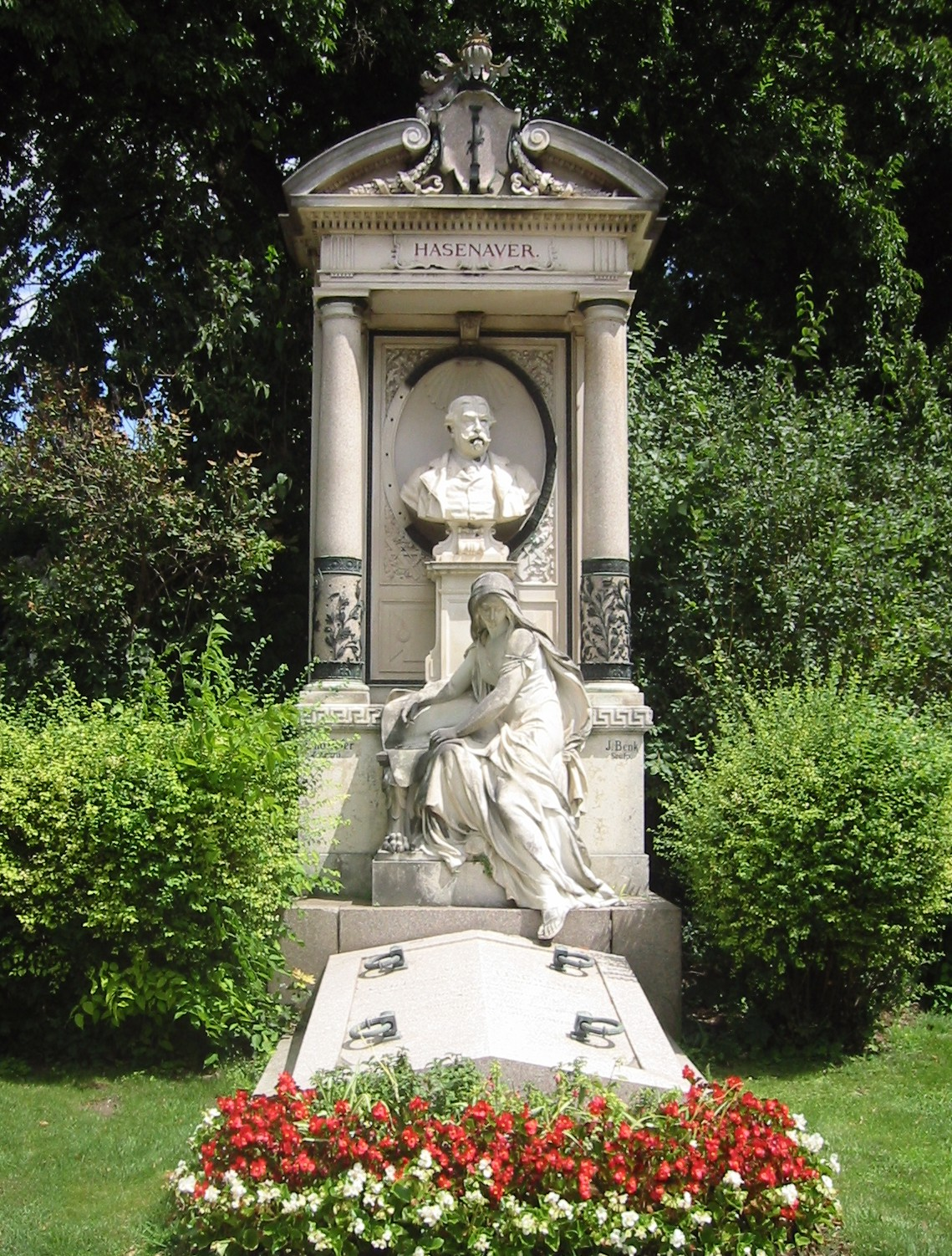 Grab von Karl von Hasenauer am Wiener Zentralfriedhof